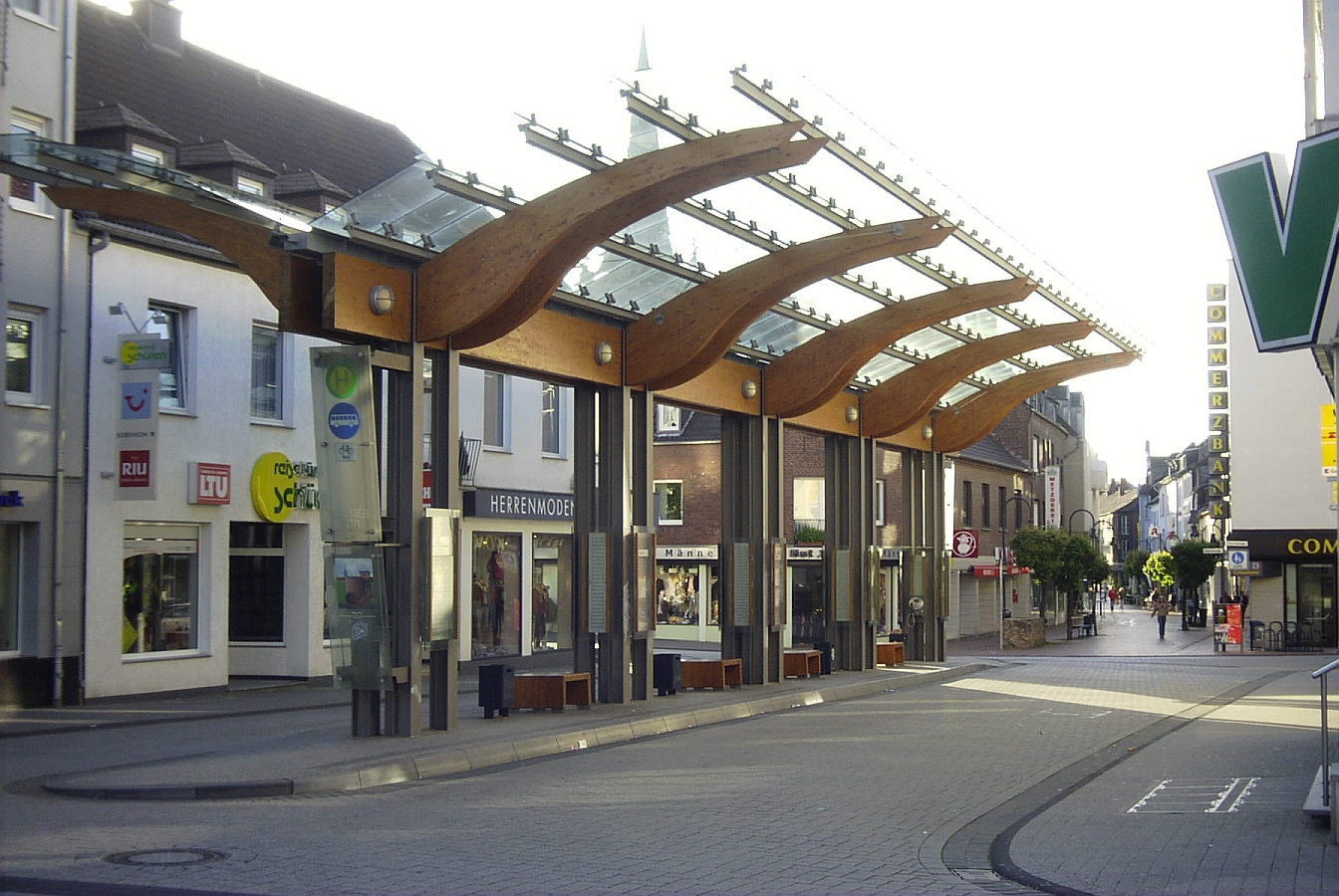 Bildbeschreibung:Erkelenz, Kölner Tor, Bushaltestelle (im Volksmund auch "Feller-Propeller") Quelle: eigenes Foto Fotograf/Zeichner: bodoklecksel 18:21, 2. Jun 2006 (CEST)